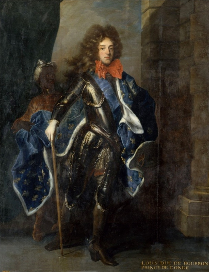 Représenté en 1694 en armure, suivi d'un page noir portant la queue de son manteau